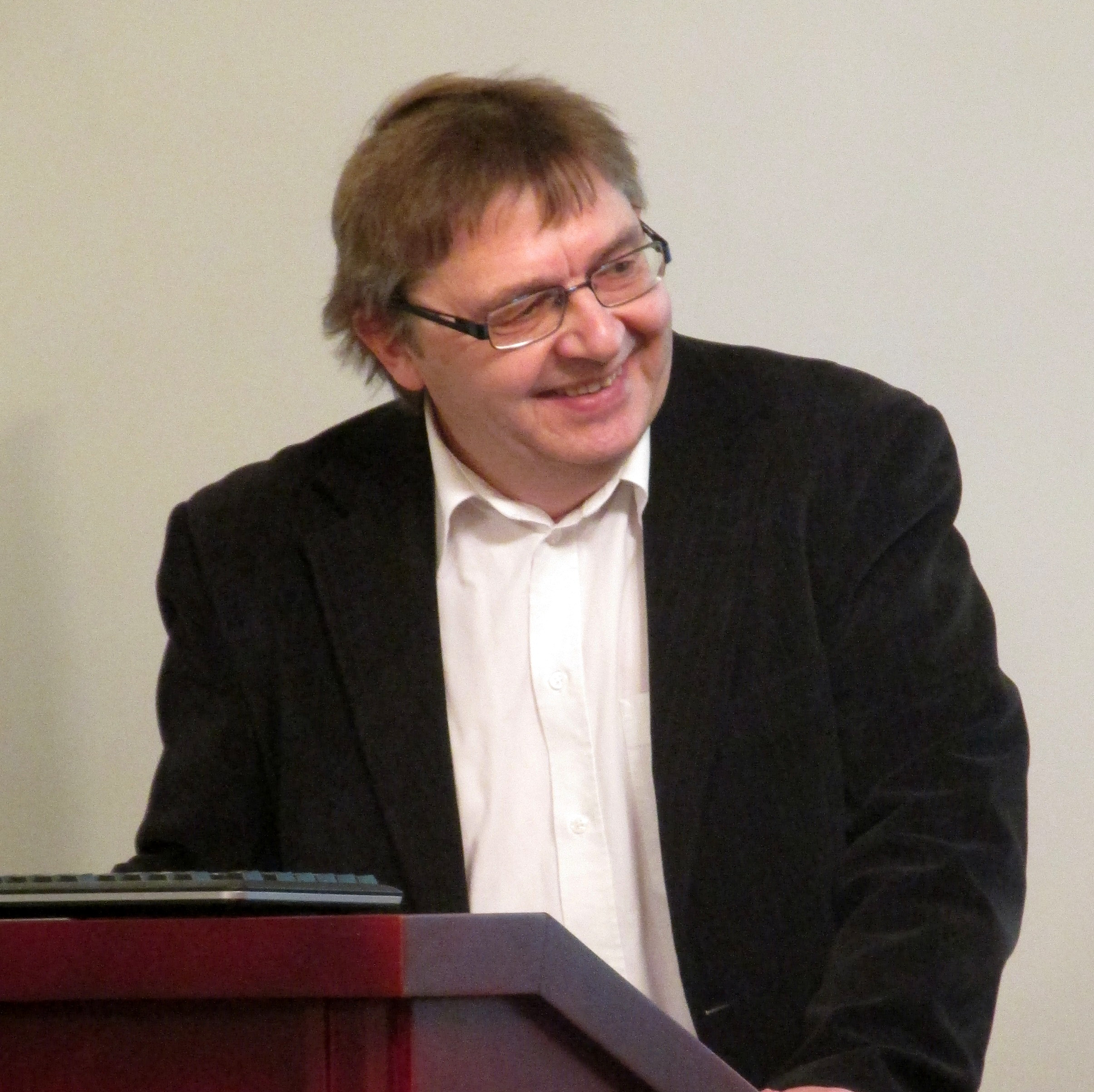 Ajaloolane Mati Laur esinemas 29. novembril 2014 toimunud seminaril "Läänemeri meets Ostsee".